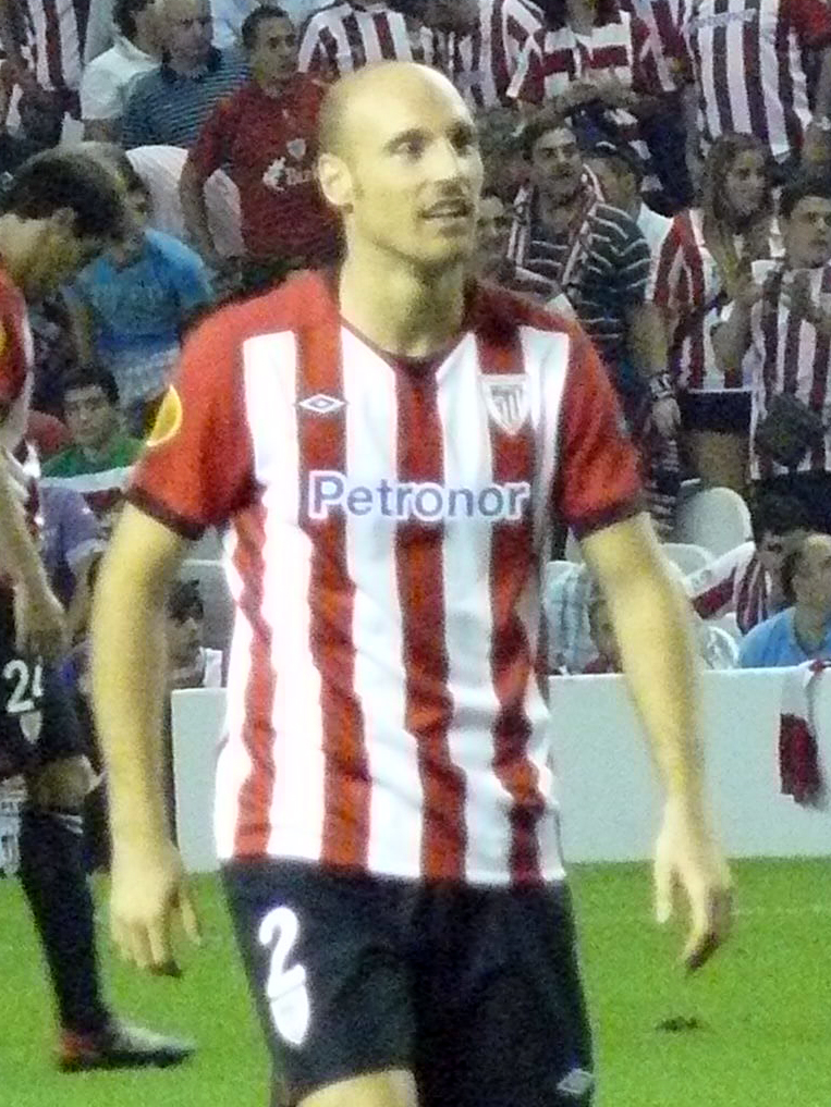 Gaizka Toquero, jugador del Athletic Club.